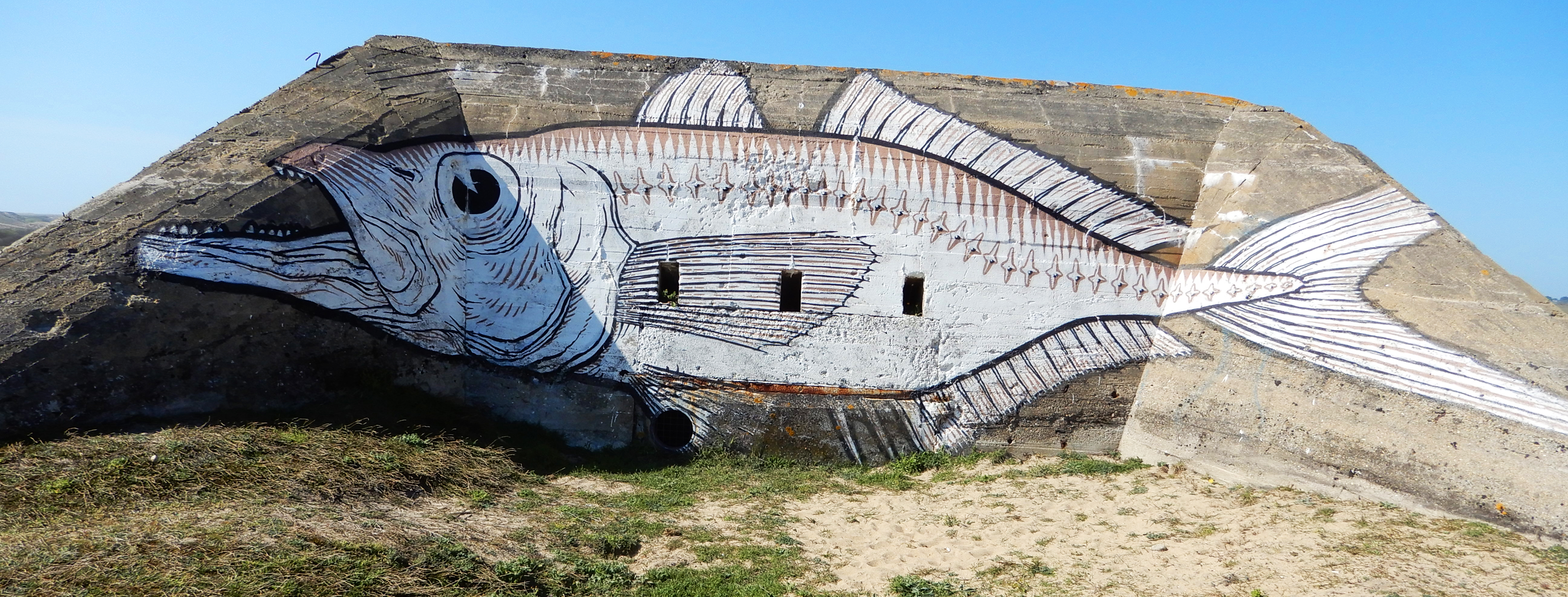 Plouhinec - Blockhaus du Sémaphore